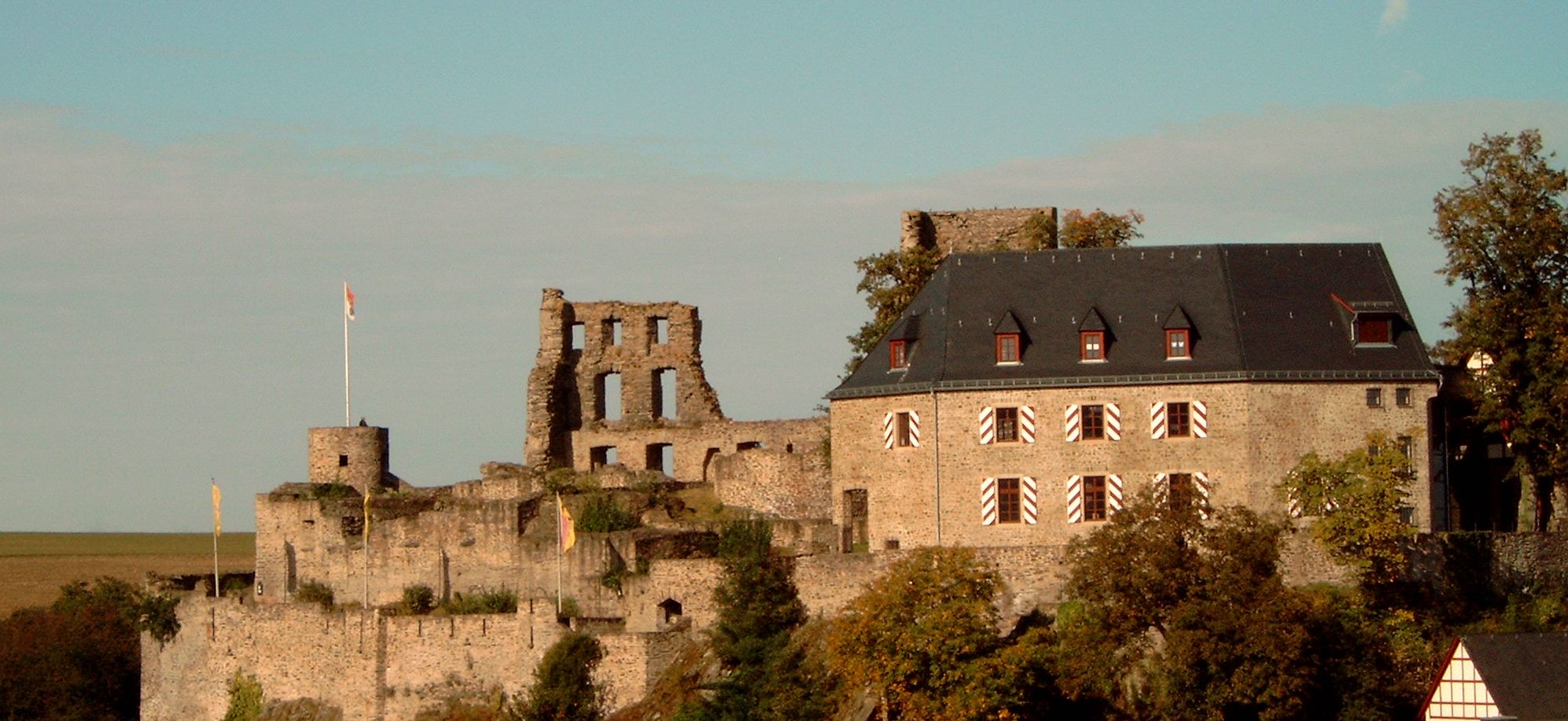 Burgberg mit Kastellauner Burg